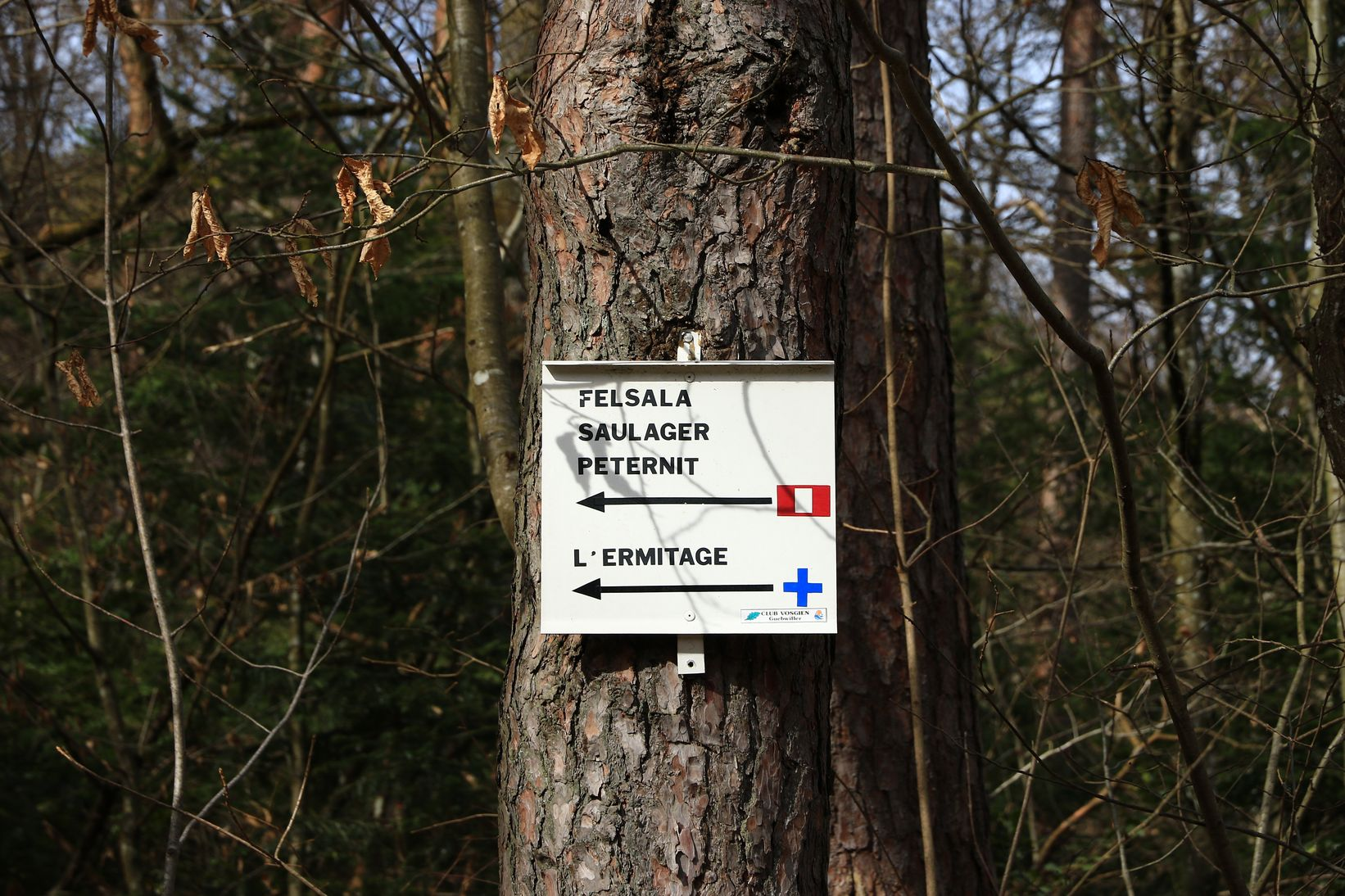 Suivre le sigle rouge-blanc-rouge.